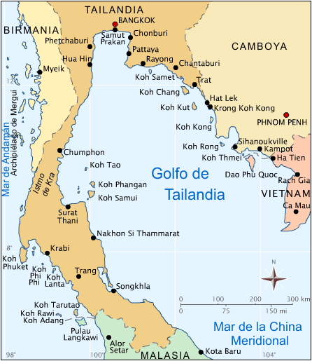 Golfo de Tailandia y el Istmo de Kra.